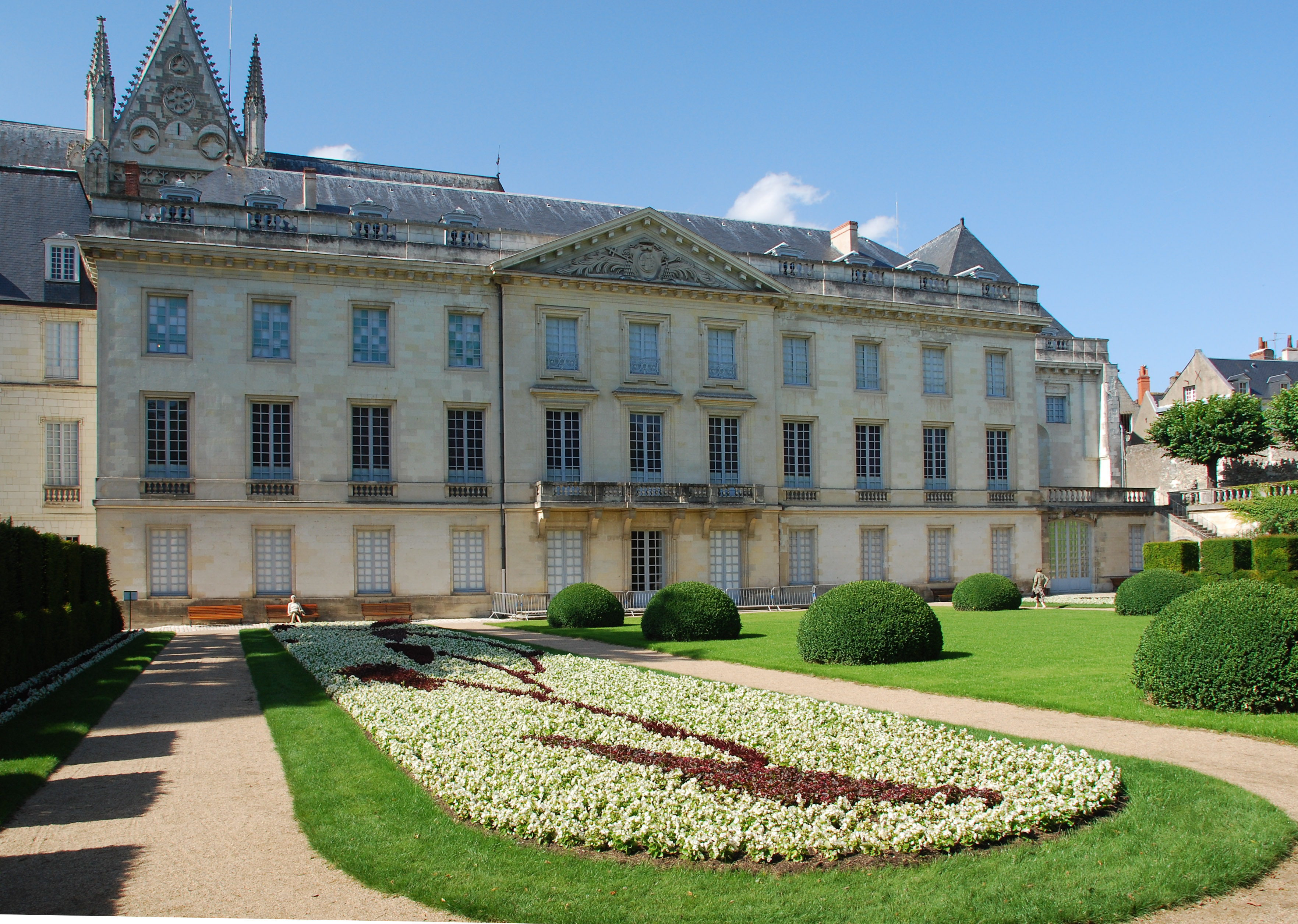 Jardin du musée des Beaux-Arts, Tours, Indre-et-Loire, France